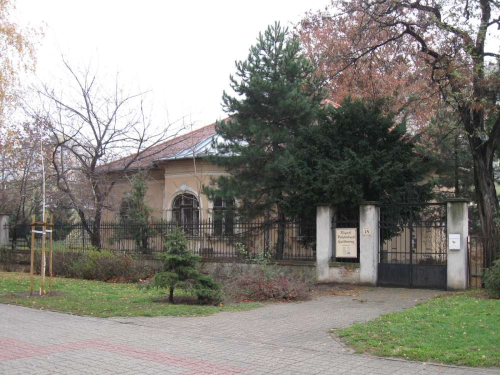 Kispesti Helytörténeti Gyűjtemény épülete. Budapest, XIX. ker., Fő utca 38. (a templom előtt)